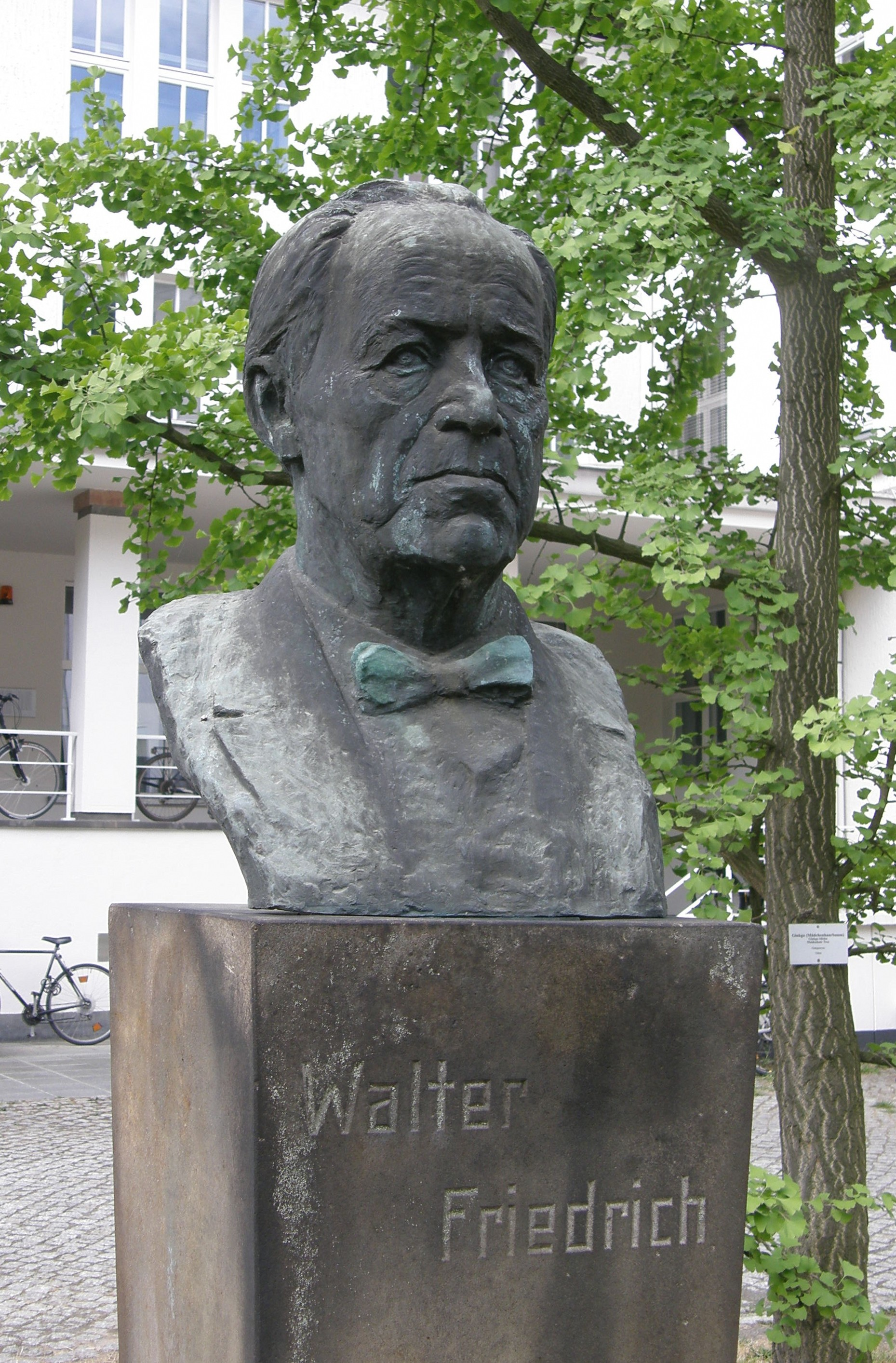 Bronzene Büste des Biophysikers Walter Friedrich. Geschaffen 1964 von Maria Schockel-Rostowskaja. Standort auf dem biomedizinischen Campus Berlin-Buch vor dem "Max Delbrück Communications Center".